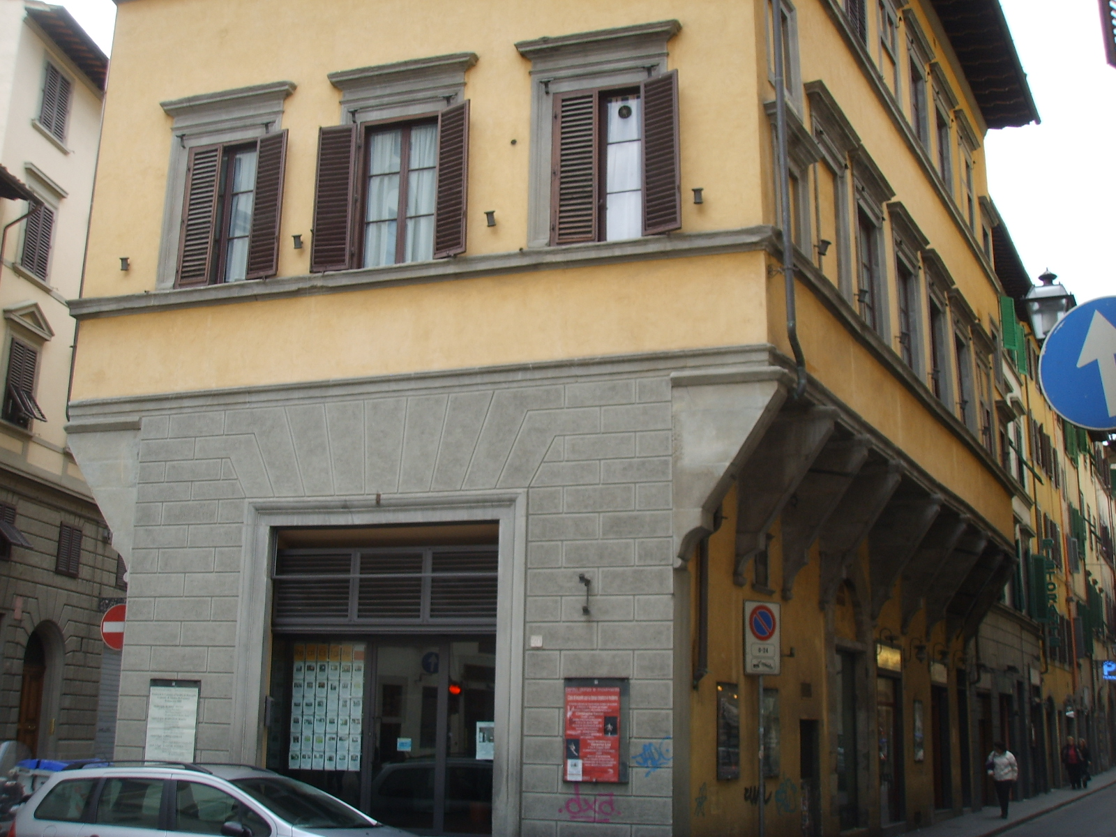 Palazzo degli sporti